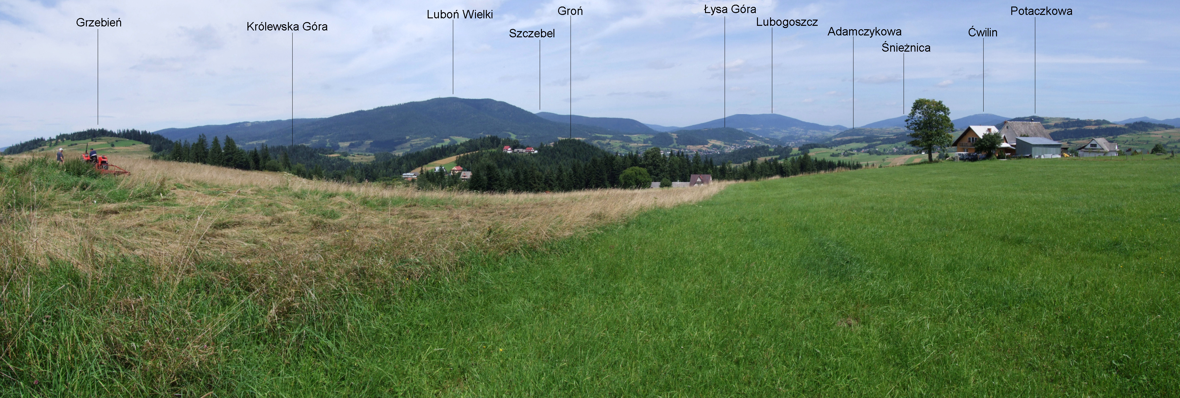 Panorama z Olszówki